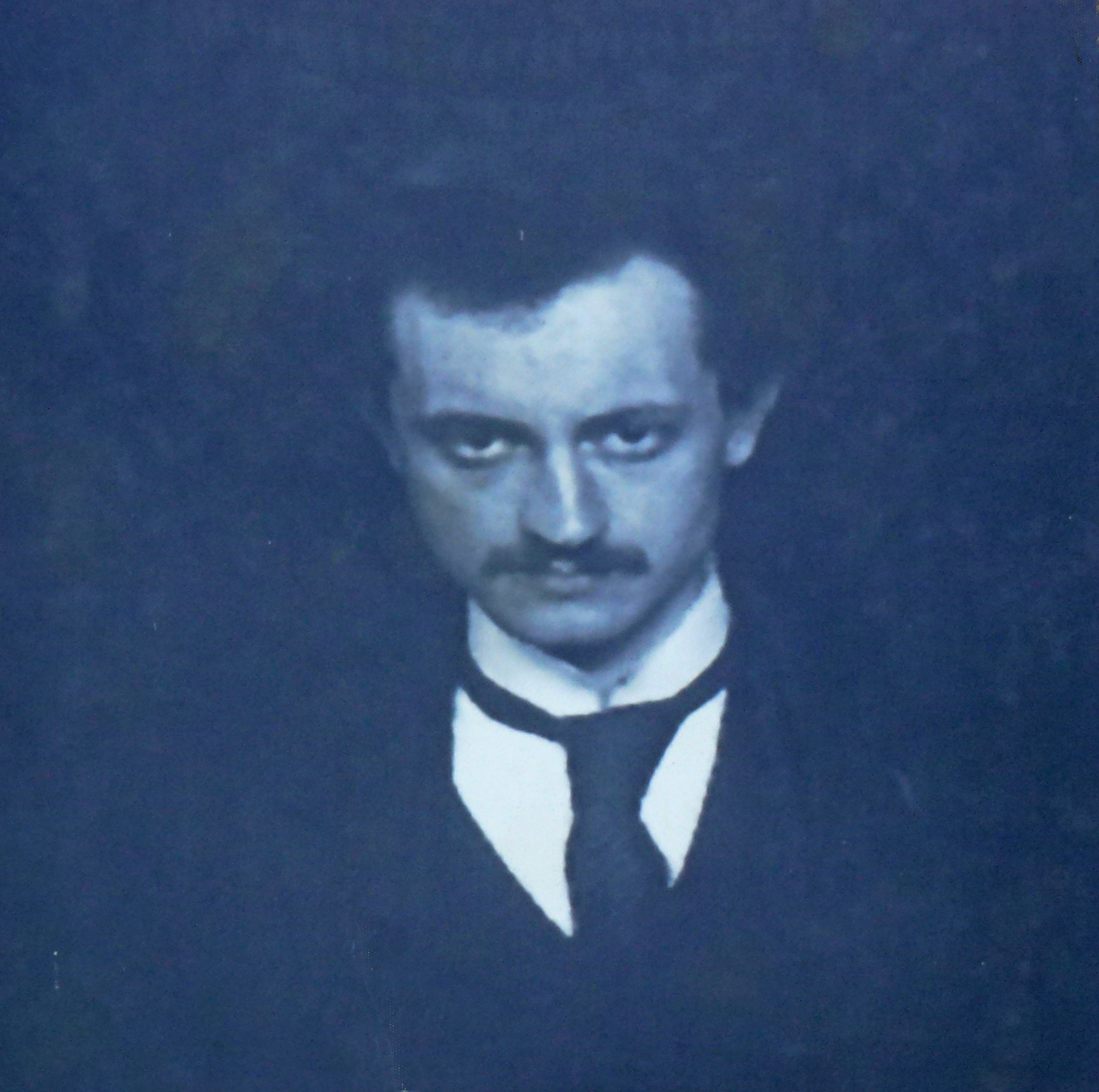 Arthur van Schendel (1874-1946) schrijver van o.a. Jan Compagnie